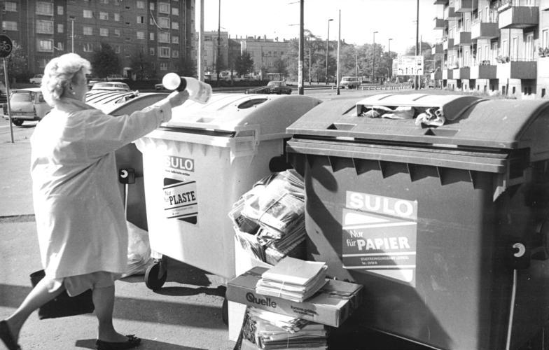 ADN-Friedrich Gahlbeck 11.10.90 Leipzig: Hausmüll- Das Stadtreinigungsamt hat nun zwar damit begonnen, Behälter zum Erfassen von Altstoffen für Glas aufzustellen, nur ist damit das bewährte Sero-System nicht ersetzt und Anlaufschwierigkeiten bringen überquellende Container mit sich. Information added by Wikimedia users.Müllcontainer der Firma Sulo in Leipzig